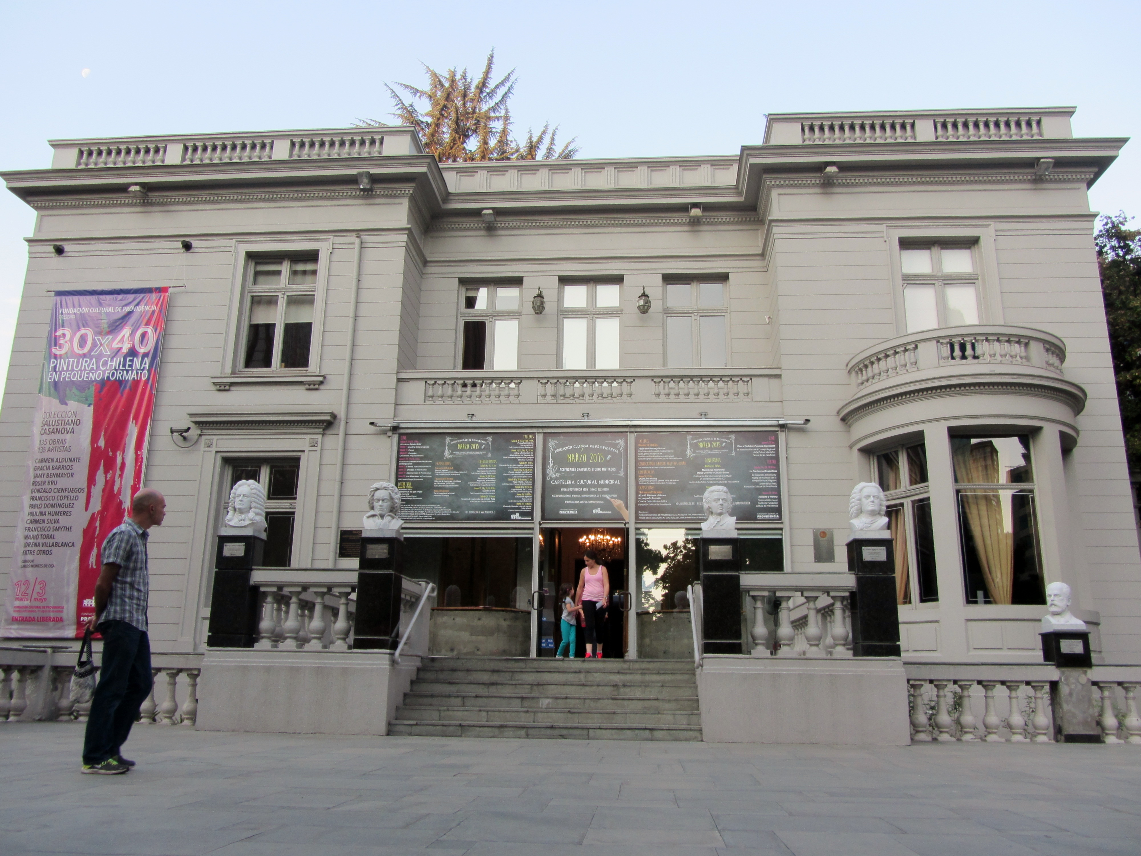 Palacio Schacht, sede de la Fundación Cultural de Providencia